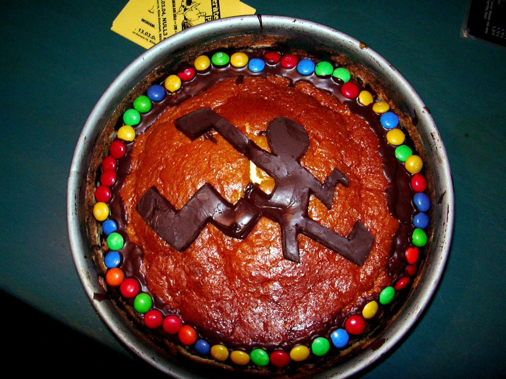 Kuchen mit dem Haujobb-Logo (anlässlich des 10-jährigen Bestehens) Aufgenommen am 03.03.2004 im null3 in Köln von Avatar. originally uploaded to on 04:32, 4. Apr 2005 by Avatar